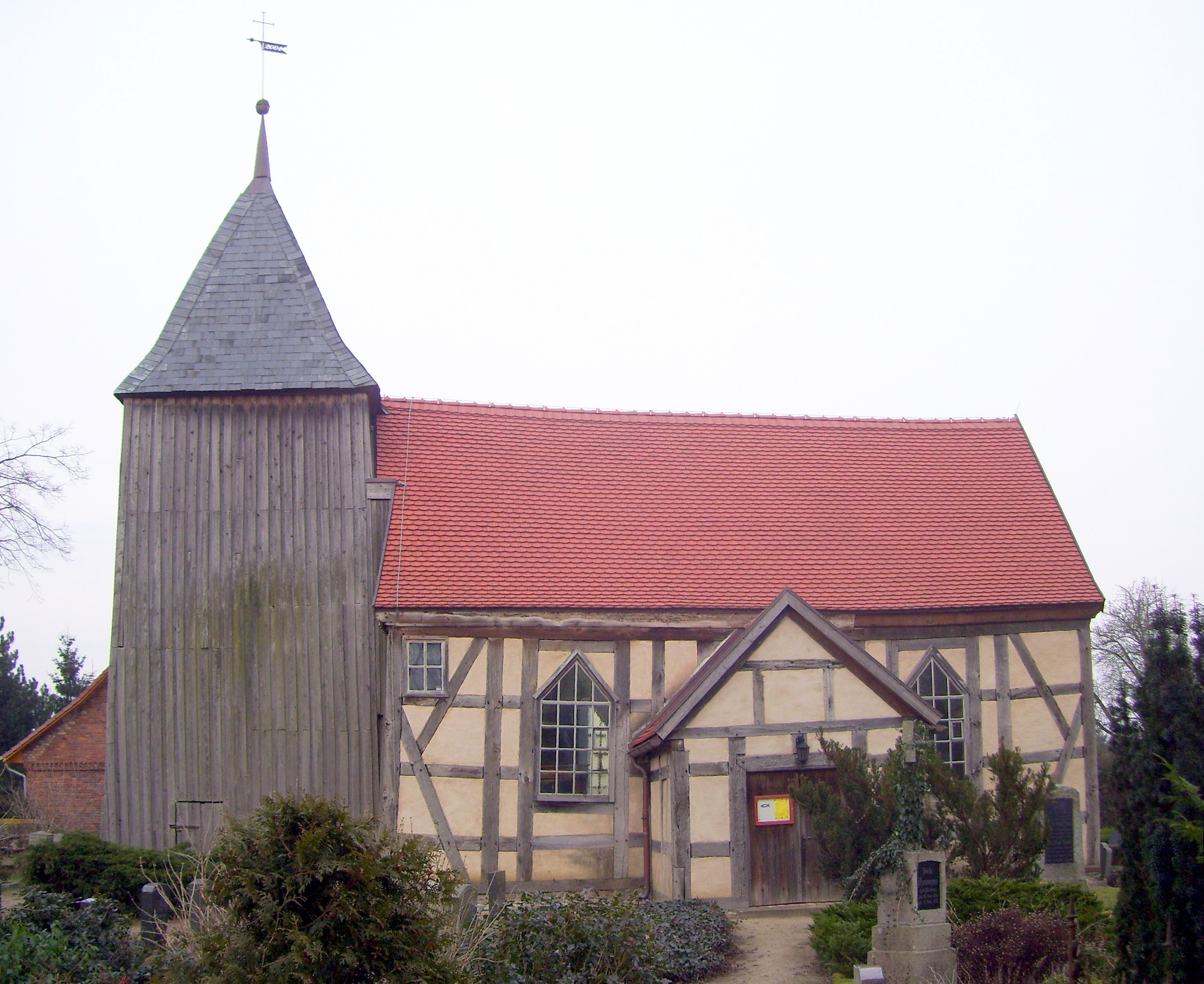 Kirche in Loickenzin, Südseite